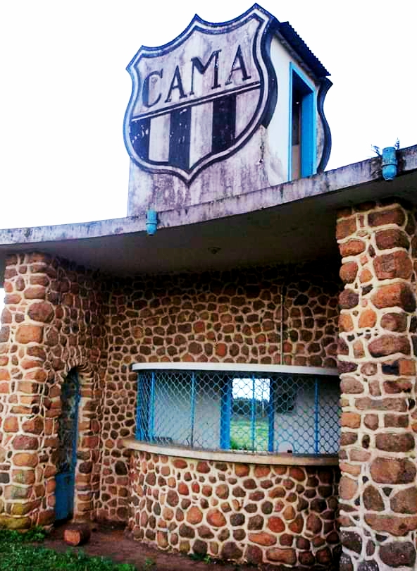 Portal de entrada do Estádio Dr Horácio Klabin, em Harmonia, em Telêmaco Borba, no Paraná.